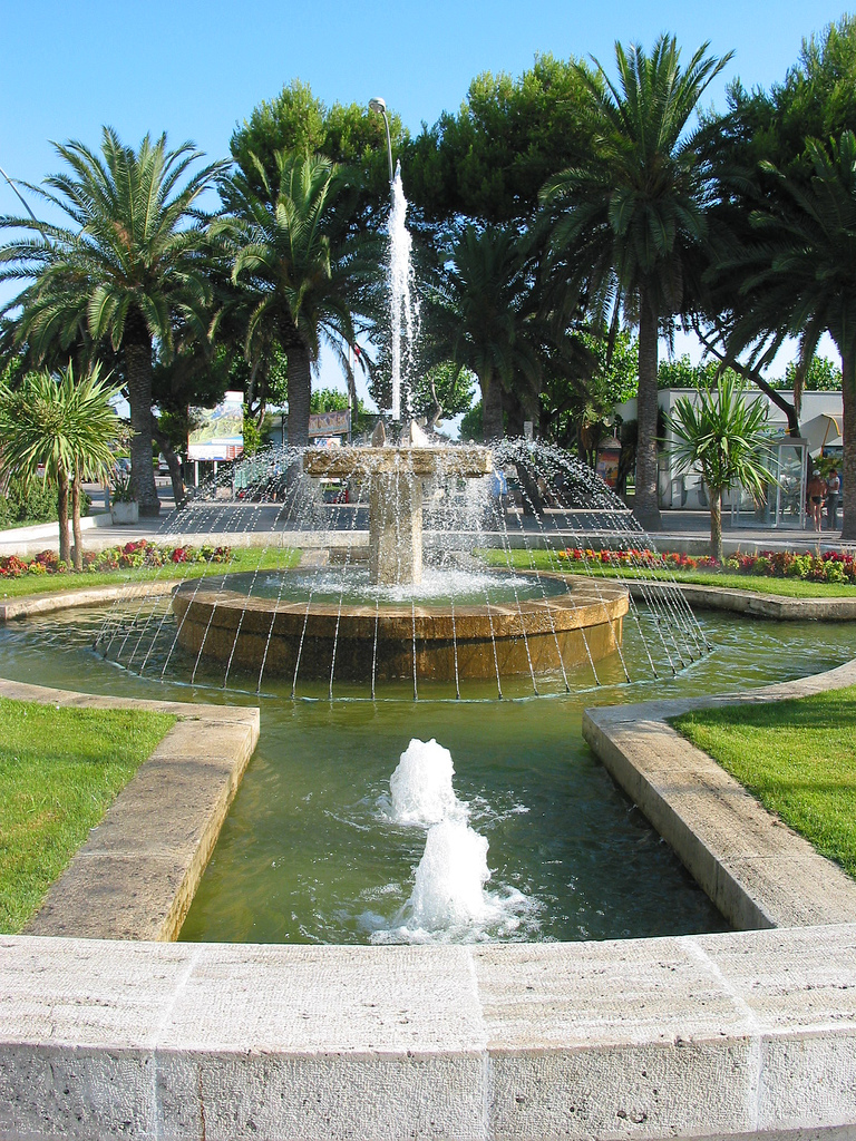 Alba Adriatica, Abruzzo, ItaliaFountain in Alba adriatica